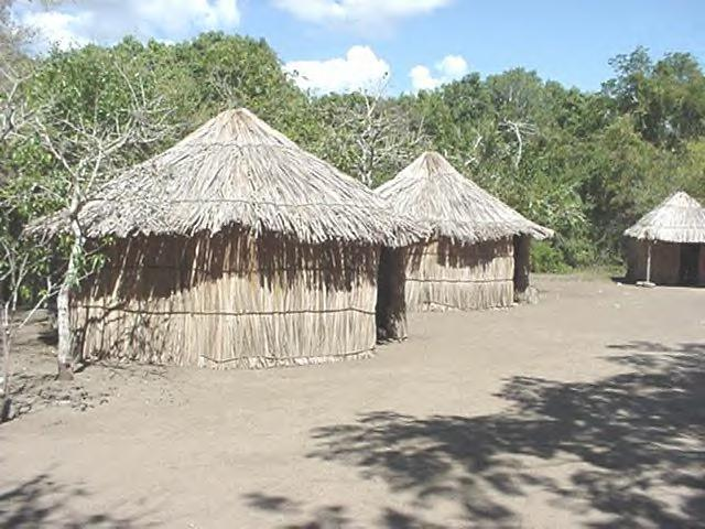 Деревея ТаиноImage of Taíno village at Tibes Indigenous Ceremonial Center a municipal government of Ponce